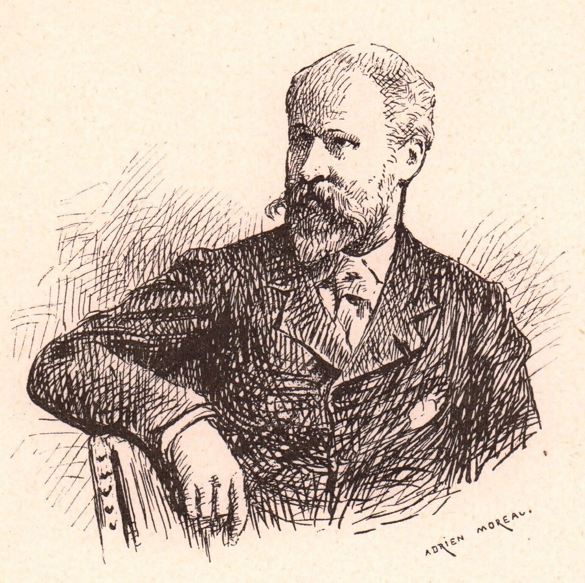 Adrien Moreau, peintre